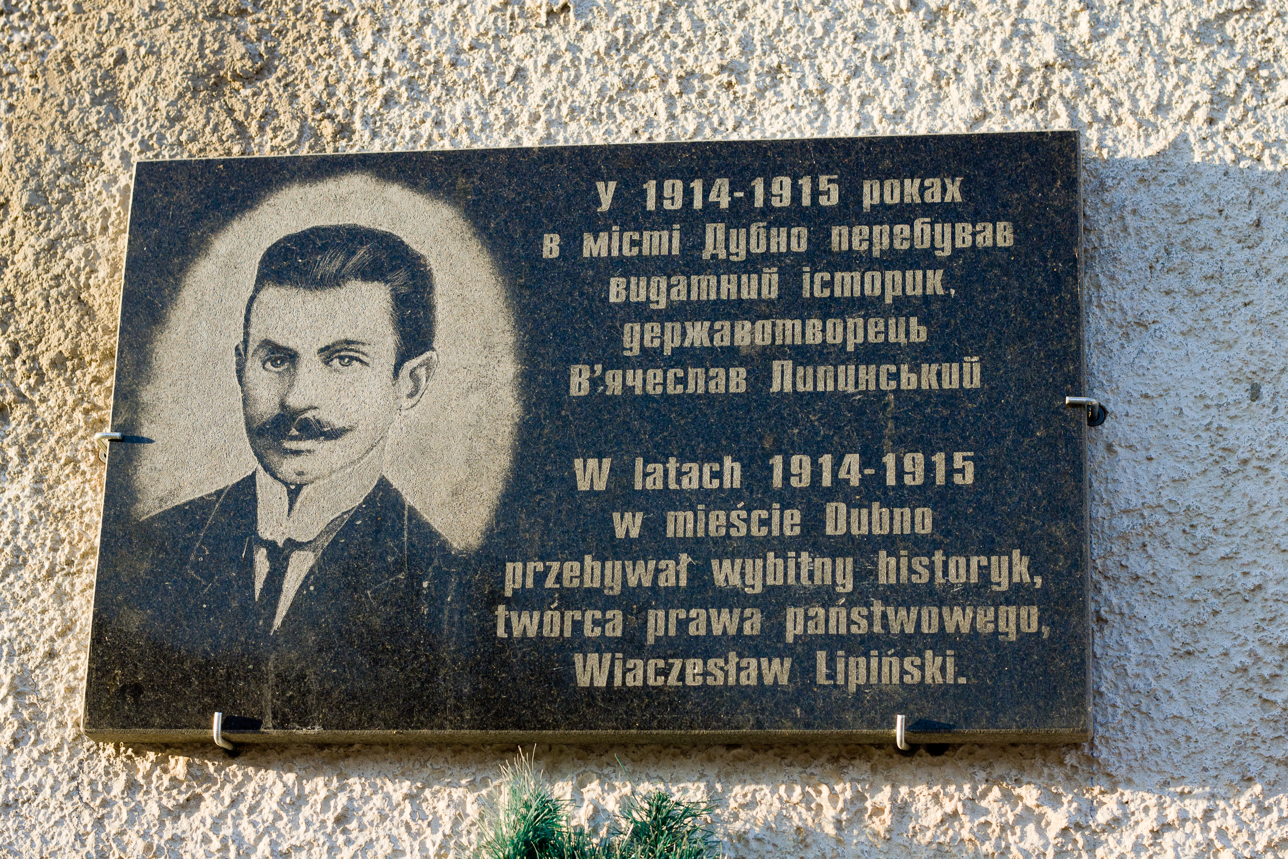 вул. князя Острозького, 18 (Костел Святого Яна Непомуки)Встановлена в 2012 році.